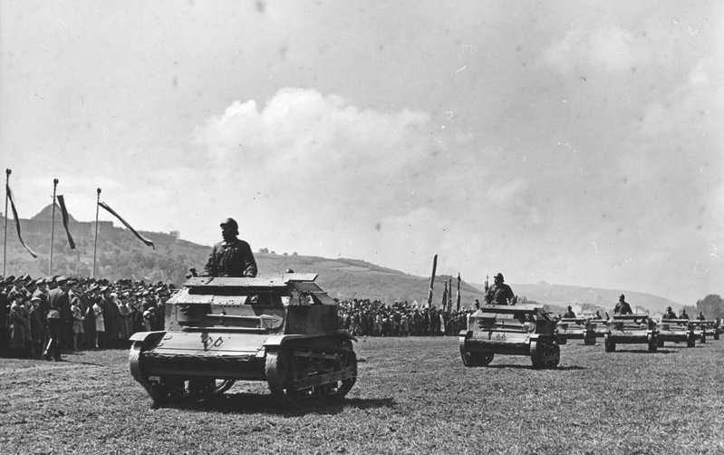 Uroczystości 3 Maja w Krakowie - defilada tankietek TK-3